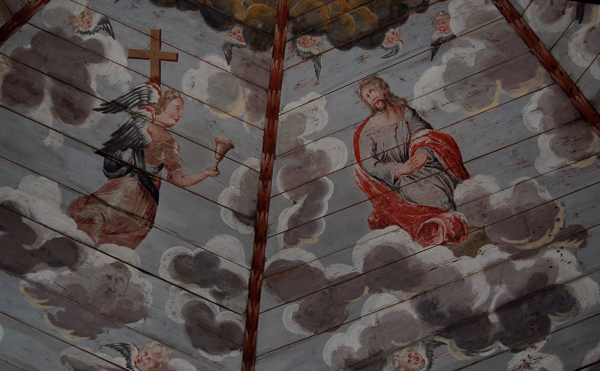 Delar av takmålningen i Nysunds kyrka i Åtorp Sweden. Taket målades 1747 av Karlstadskonsrtnären Peter Mård. I denna bild ser man Kristus i röd och grå mantel samt en ängel som närmar sig med ett kors och en kalk.